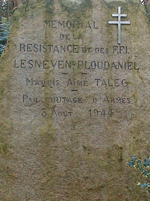 Mein-lid evit paotred ar strouezheg en Lesneven-Plouzeniel, ar makiz Aimé Talec d'an 3 a viz eost 1944 a resevas armoù dre an aer.